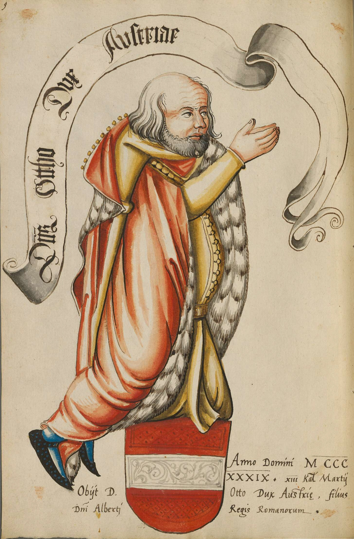 Fürstenbildnisse der Habsburger des 14. Jh. nach den Glasfenstern von Königsfelden/Aargau - BSB Cod.icon. 330 [S.l.] Nordschweiz (Bern ?) um 1560 fol. 18v: Otto der Fröhliche, Herzog von Österreich